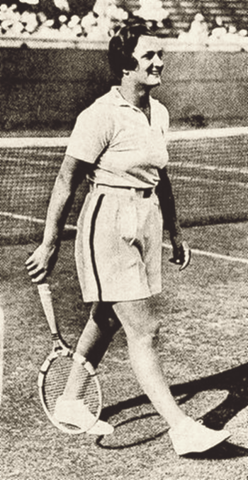 A tenista estadunidense Helen Jacobs, em 1933.